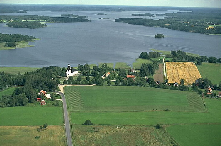 Skedevi kyrka i bildens vänstra del. Motiv: Skedevi Nyckelord: Flygbilder, Riksintressen Kategori: Insjömiljöer Skedevi kyrka i bildens vänstra del.